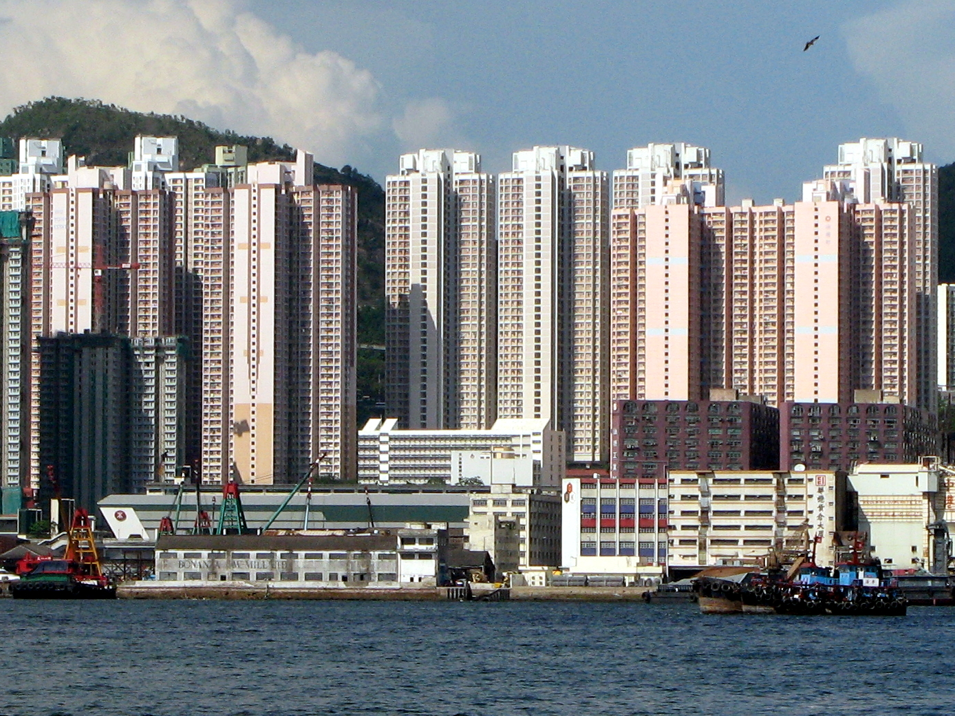 HK Yau Tong Estate in 2008 油塘邨